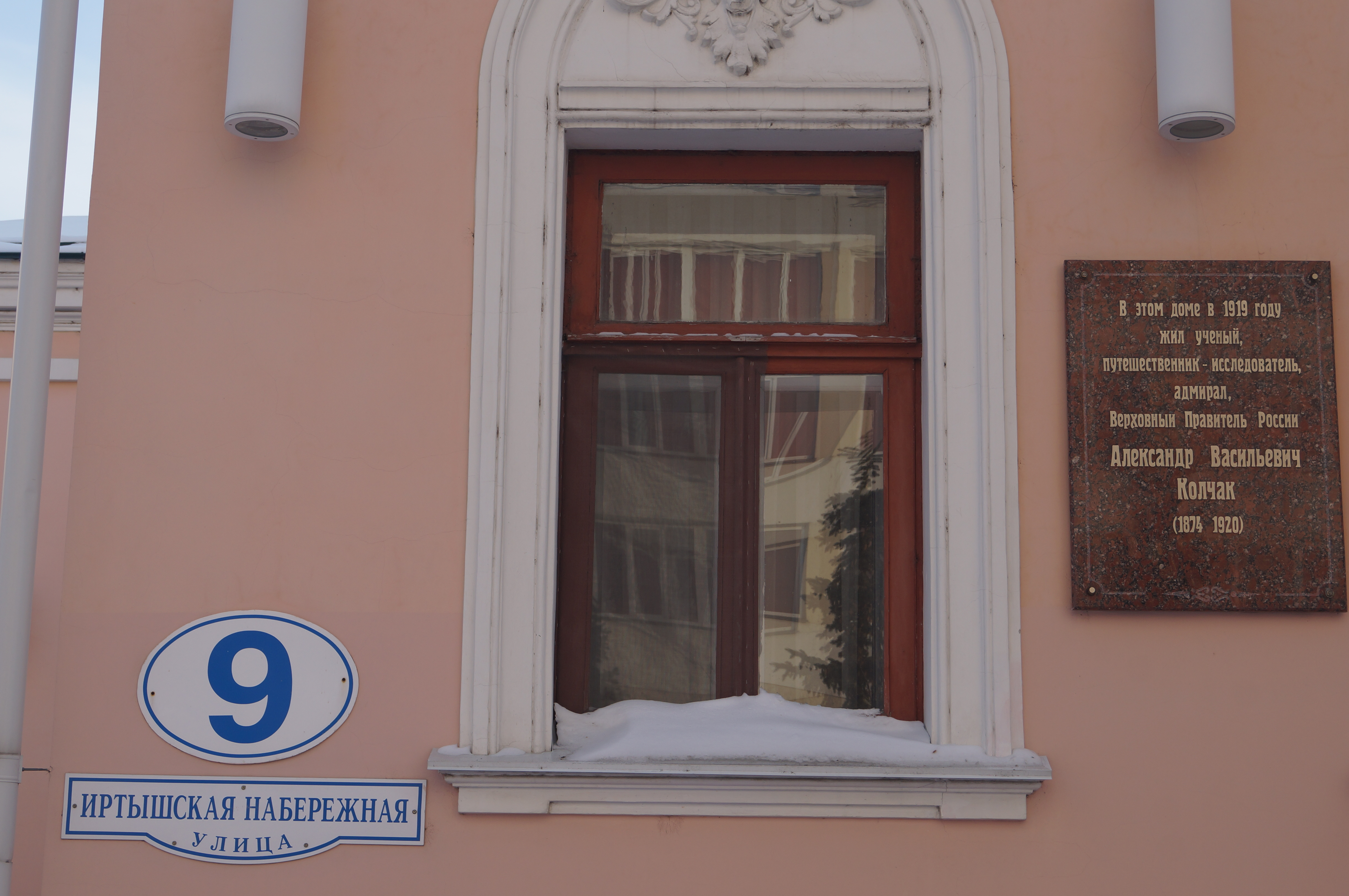 Мемориальная доска Колчаку на особняке Батюшкиных